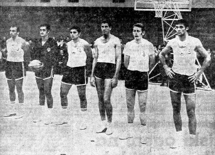 Jugoslovanska košarkarska reprezentanca. Od leve: Ivo Daneu, Dragoslav Ražnatović, Dragutin Čermak, Trajko Rajković, Vladimir Cvetković and Petar Skansi.